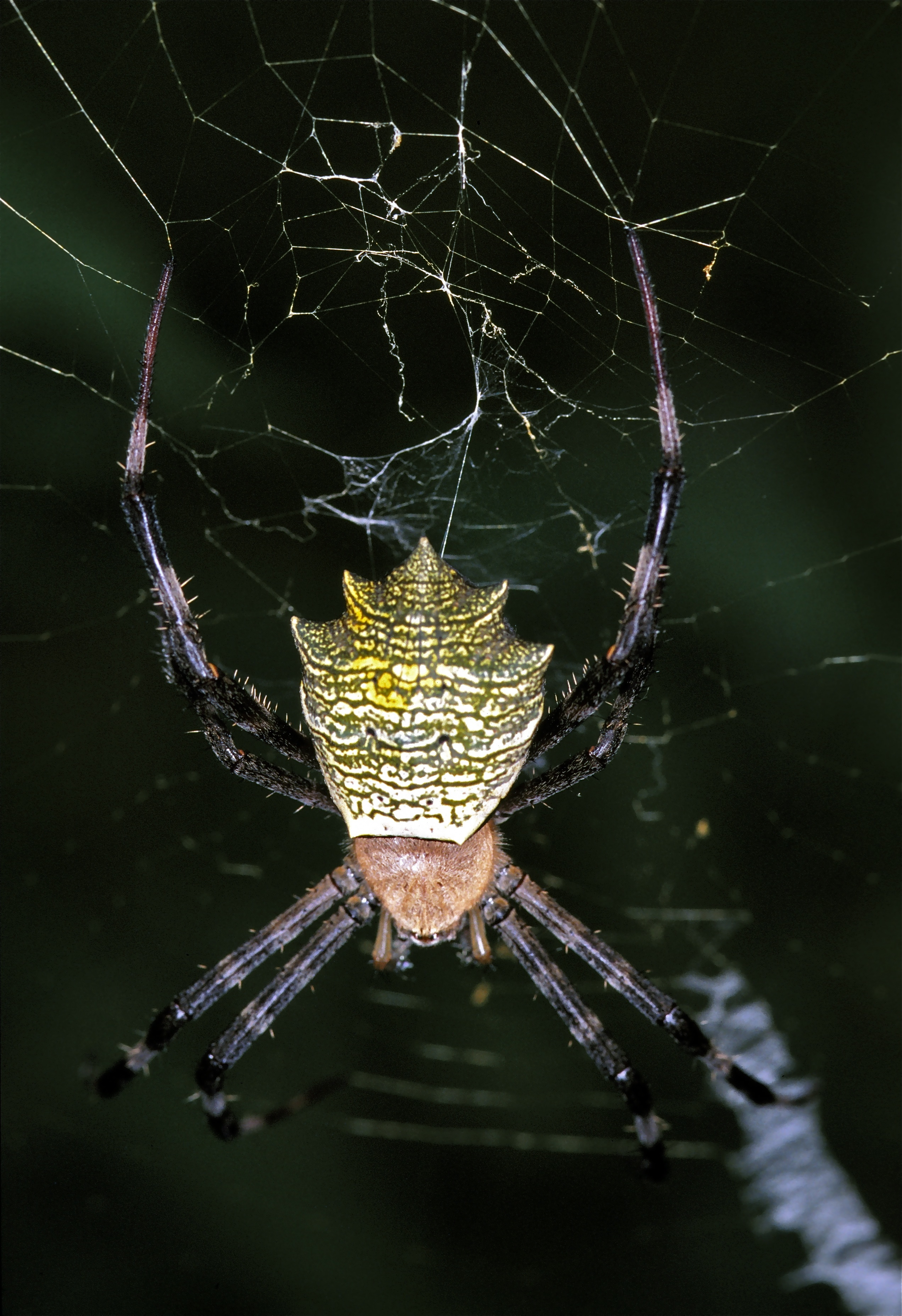 Korup NP, CAMEROON